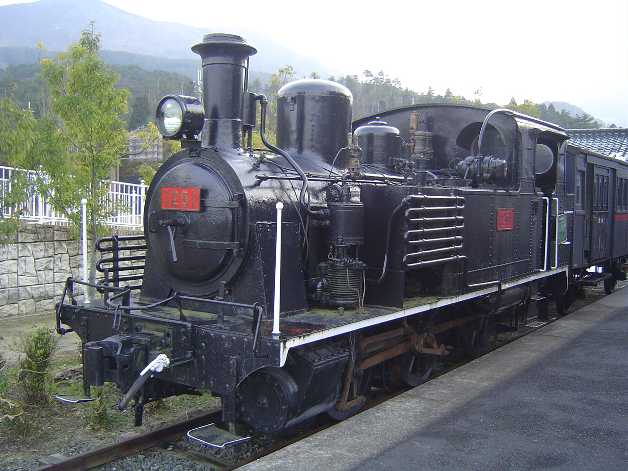 加悦鉄道（旧日本国有鉄道）1261号（1260形）蒸気機関車